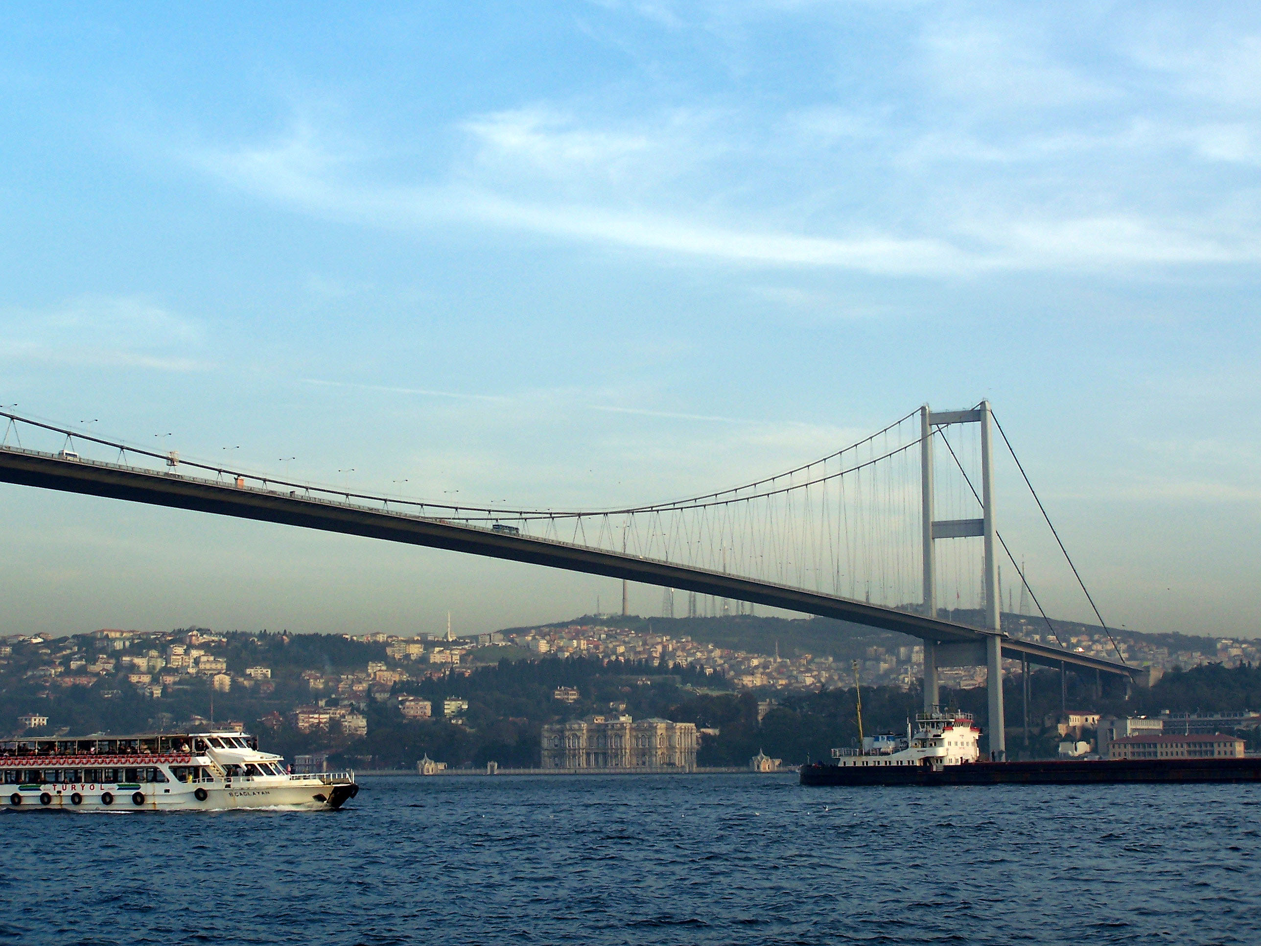 Boğaziçi Köprüsü